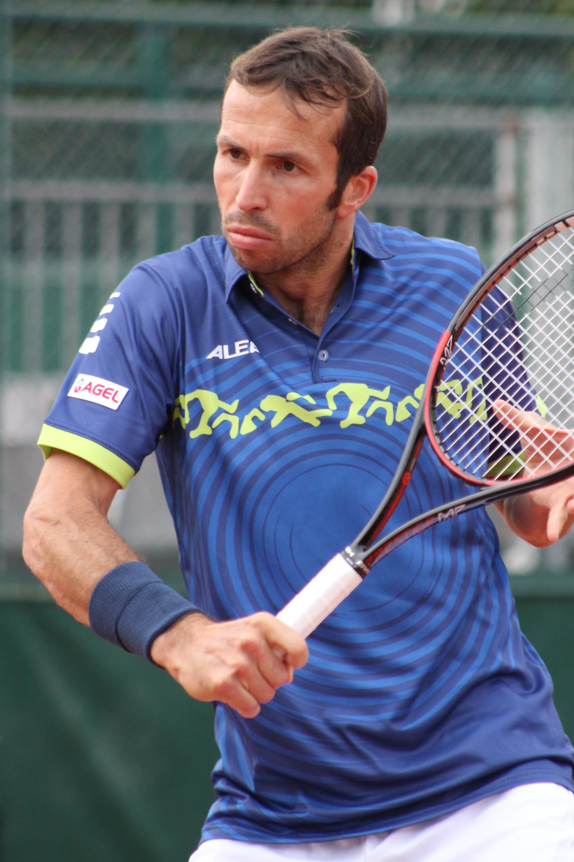 Stepanek RG16 (3)